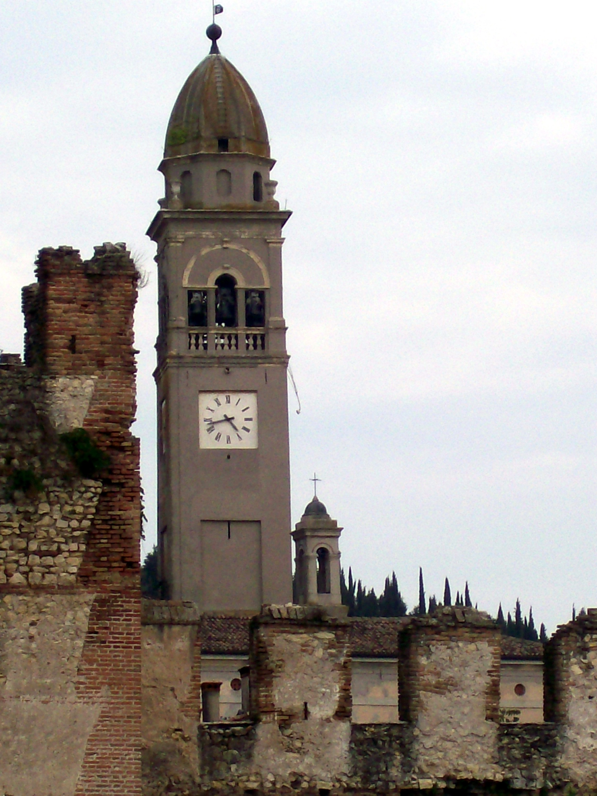 Campanile della chiesa parrocchiale di San Lorenzo in Soave (VR).